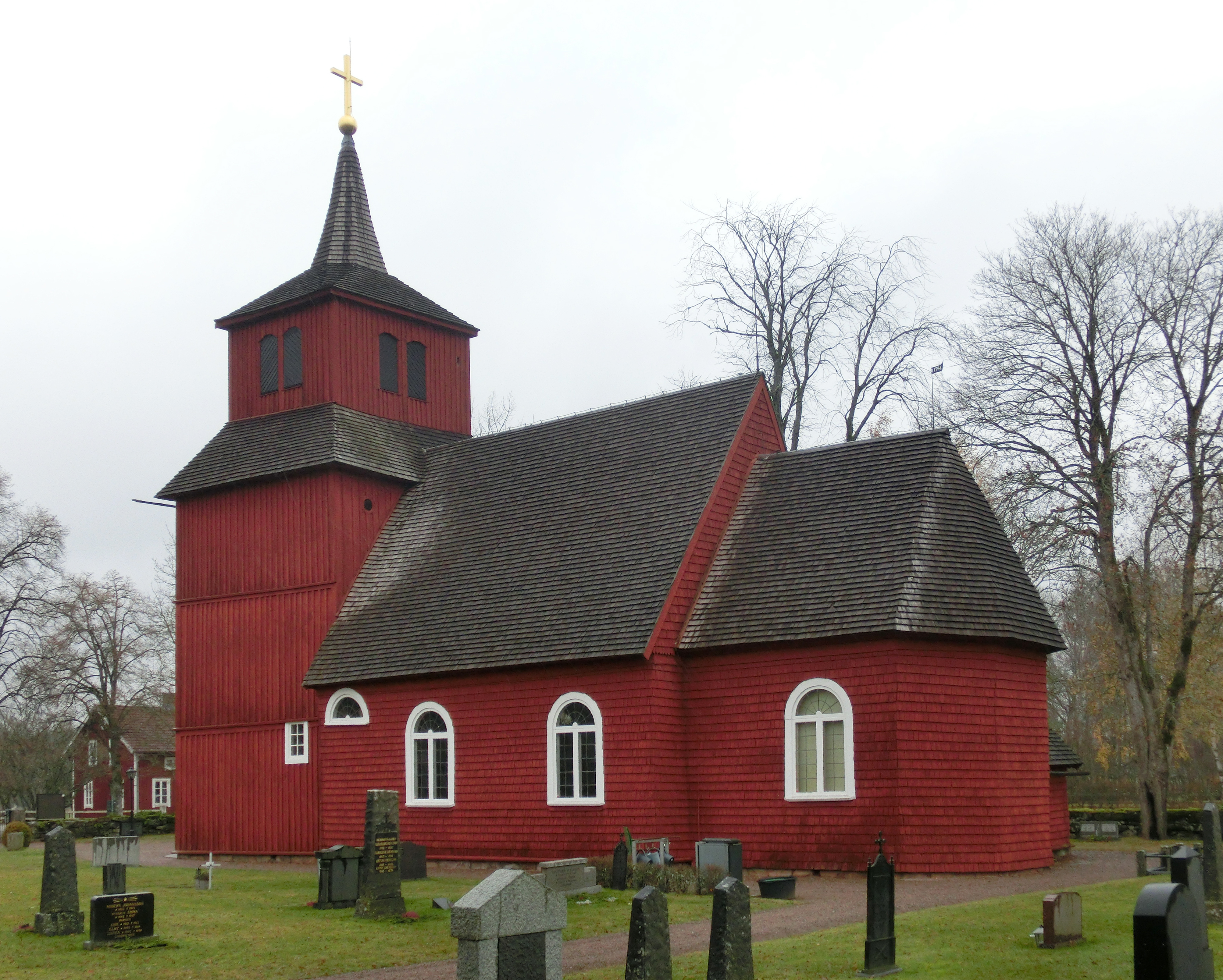 Kävsjö kyrka i Gnosjö kommun, Jönköpings län, Småland, Växjö stift, Sverige.